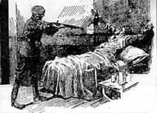 Pérez Millán asesinando a Kurt Wilckens en la Penitenciaría Nacional.